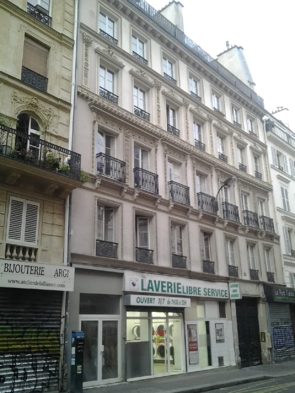 Immeuble sis 18 rue Jean-Pierre Timbaud (Paris 11e), où Charles Baudelaire habita de janvier à juin 1856. Juillet 2017.